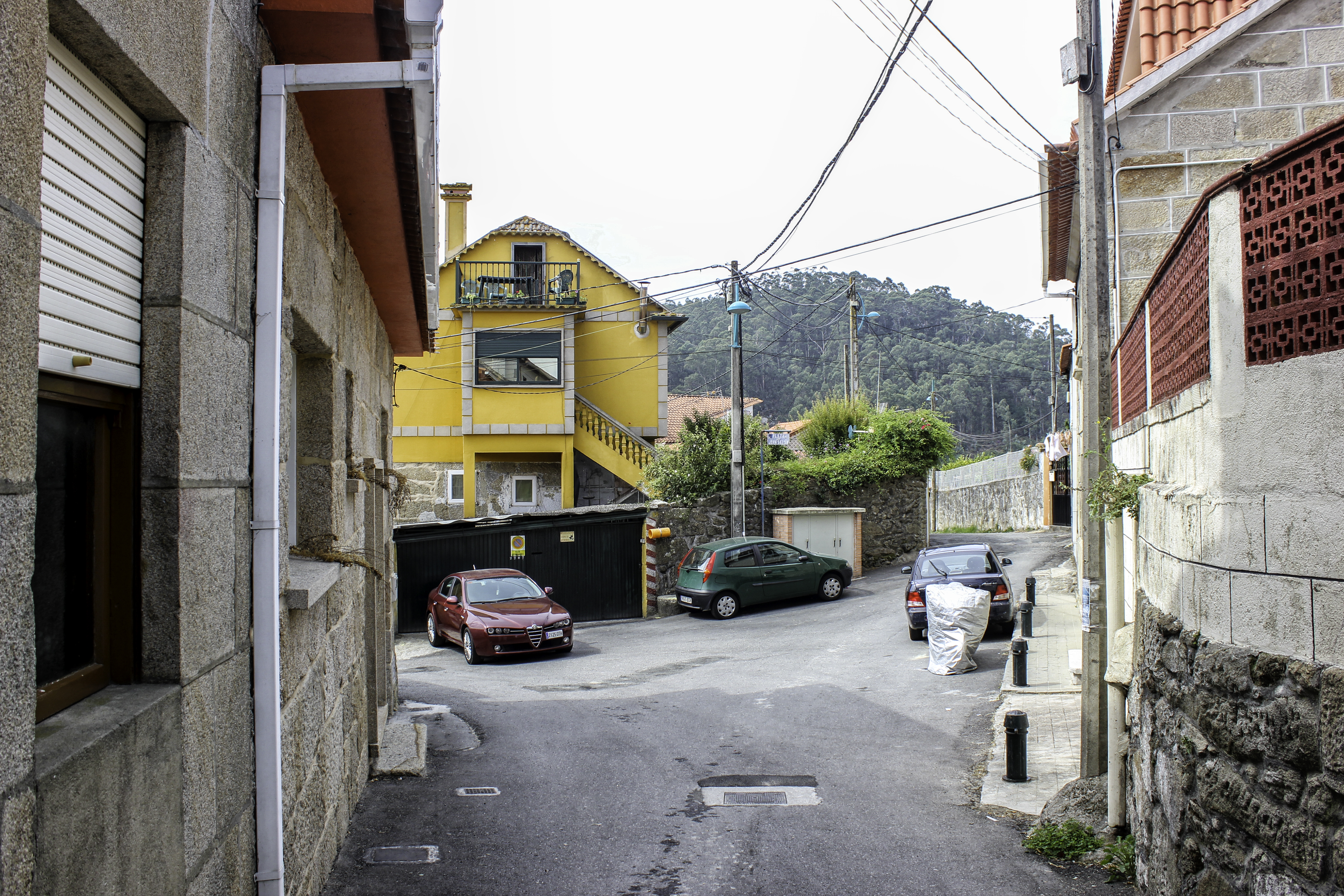 Praza de John Balan en Seixo, Marín.